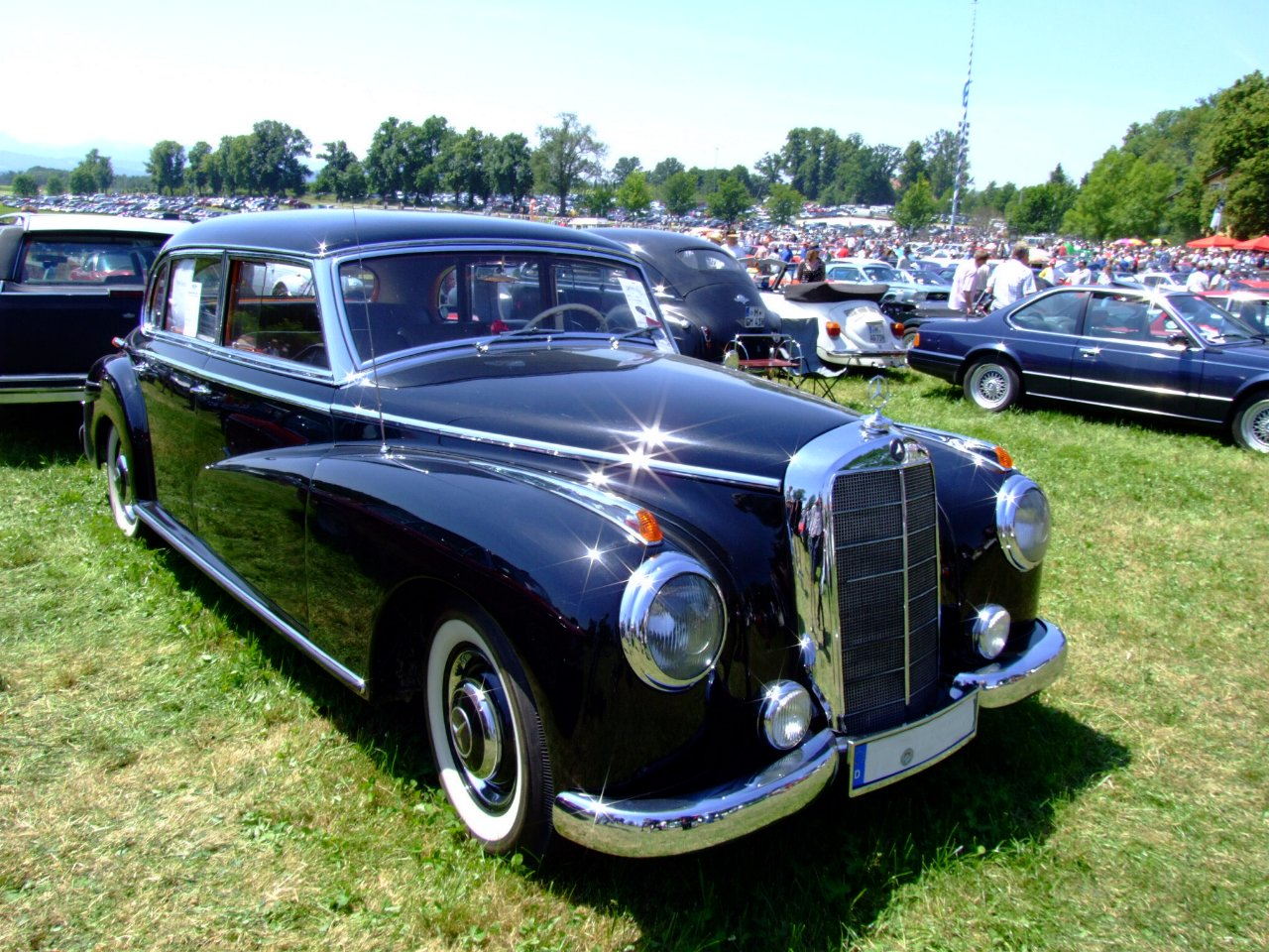 Mercedes Benz 300 Adenauer Baujahr: 1953 115 PS